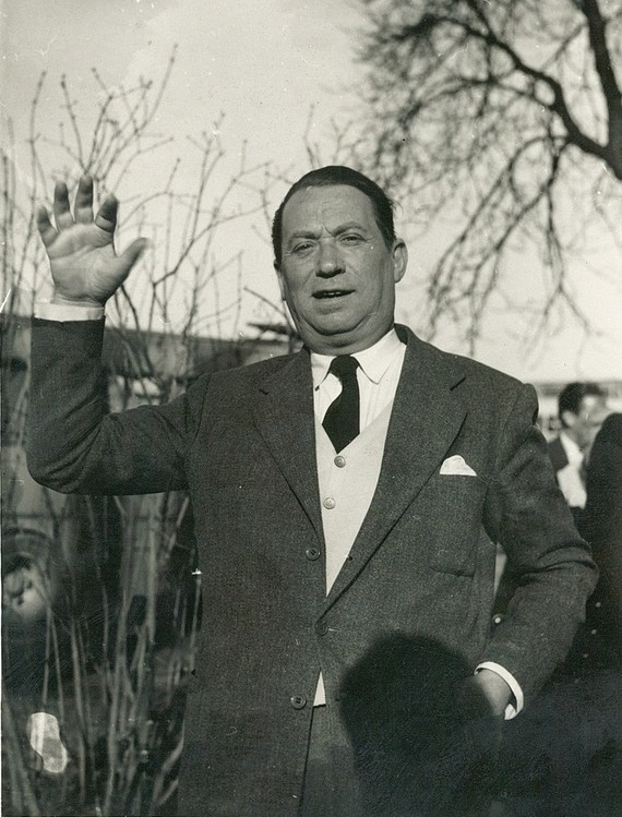 Einar Rasmus Krag Schnitler Sissener (21. september 1897 – 4. mars 1968) var en norsk skuespiller og regissør.